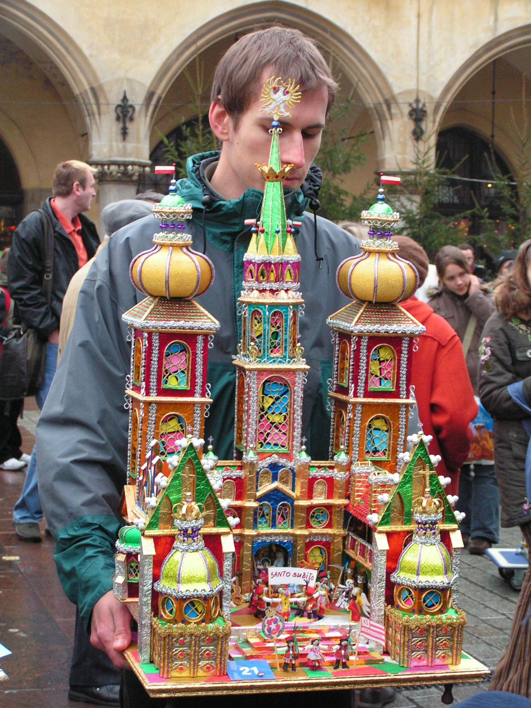 Szopka krakowska podczas konkursu na najpiękniejszą szopkę na rynku w Krakowie